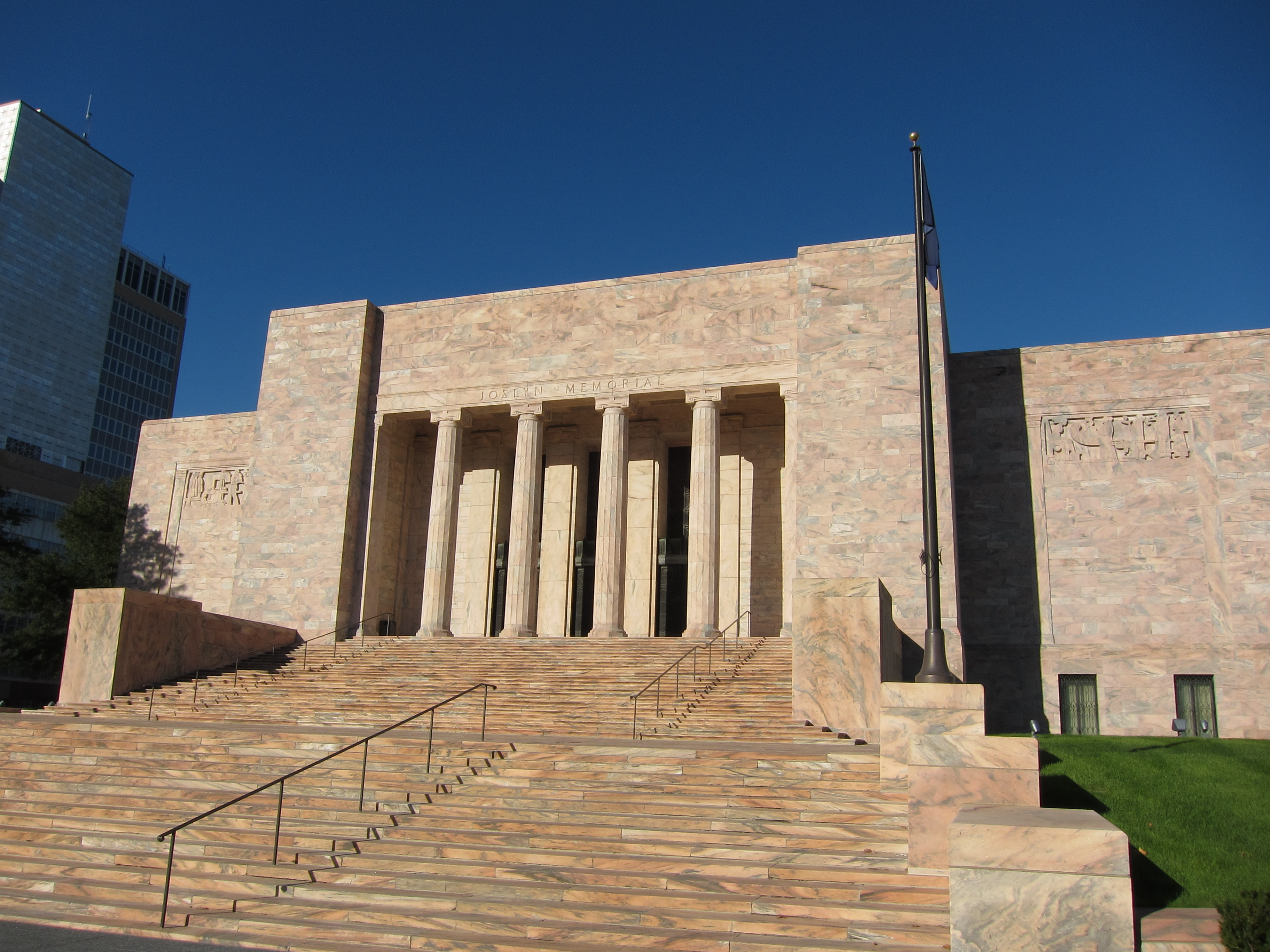 Joslyn Art Museum entrance